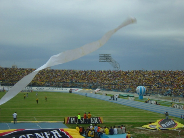 Estadio Modelo Lleno 2007